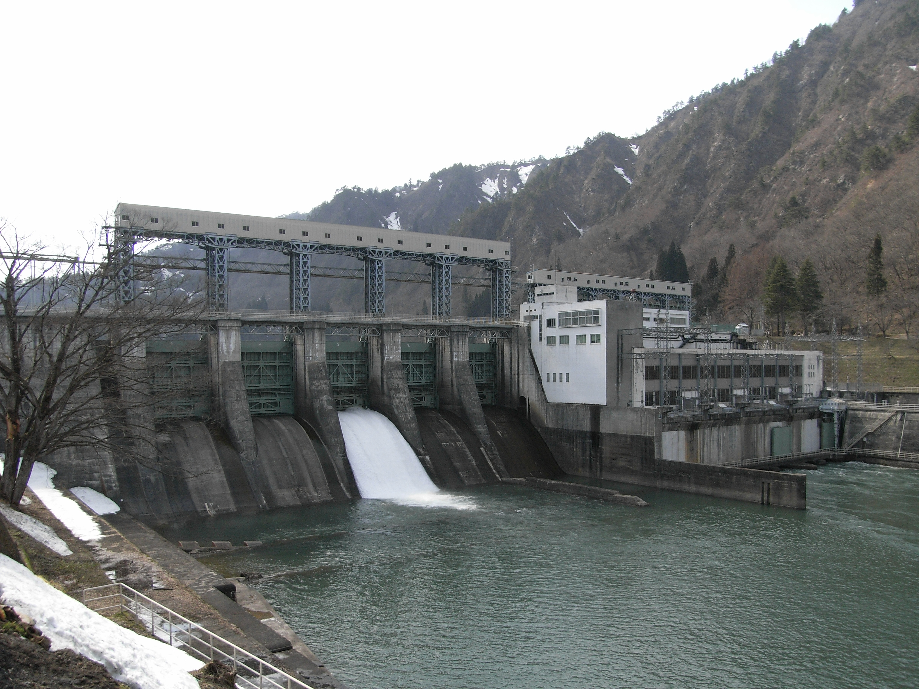 Dam